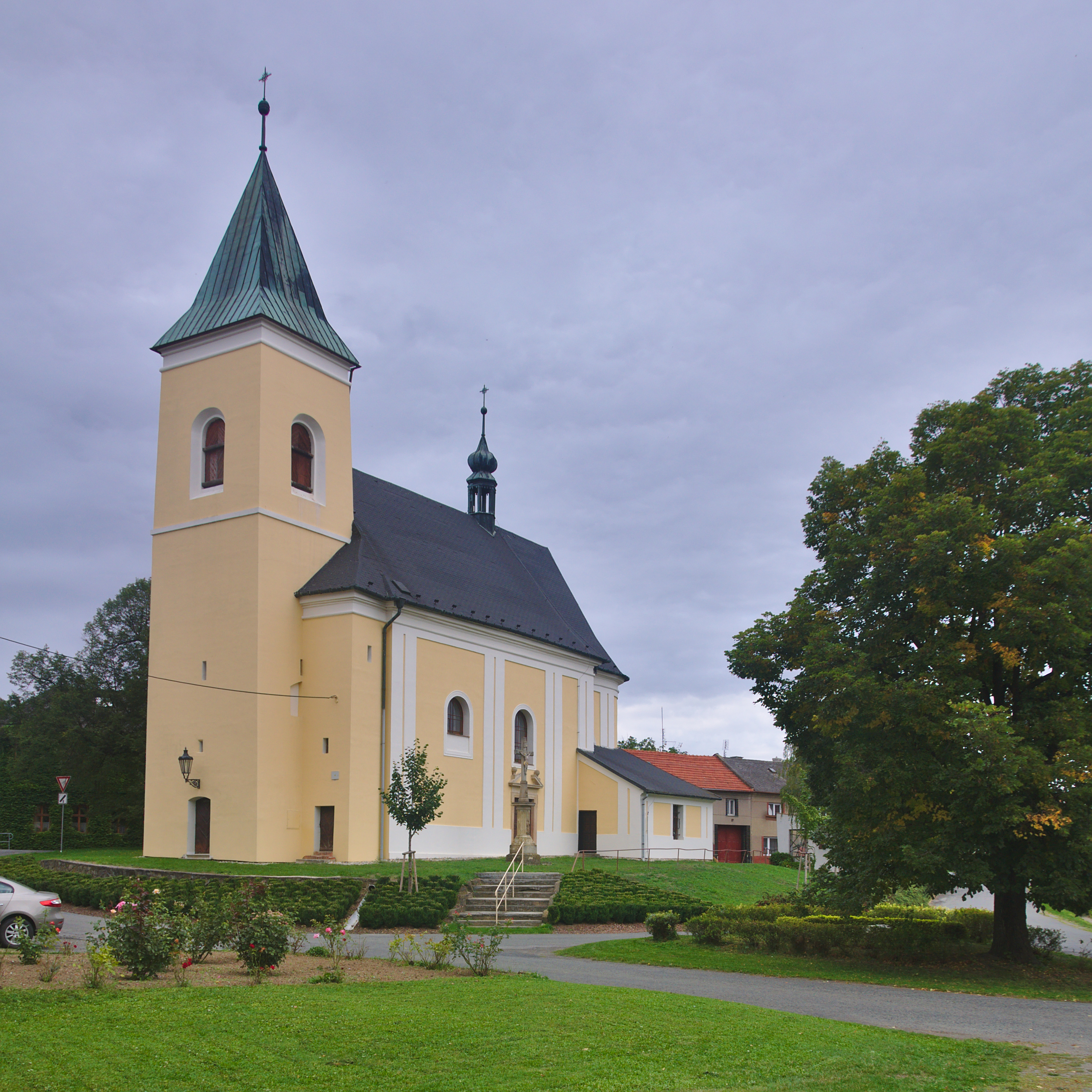 Kostel Narození Panny Marie, Stařechovice, okres Prostějov